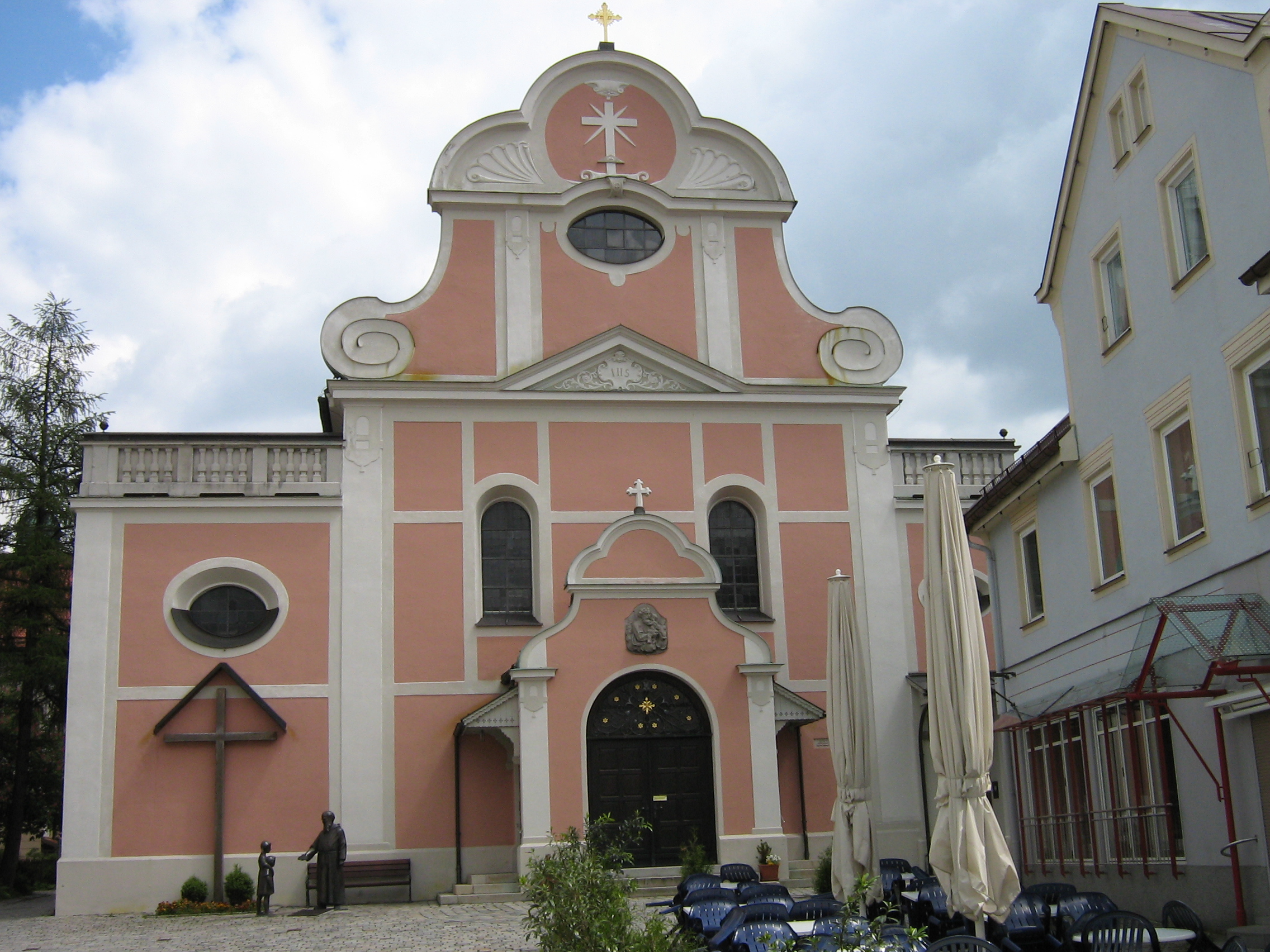 Immenstadt im Allgäu, Kirche St. Josef (ehem. Kapuzinerkirche)